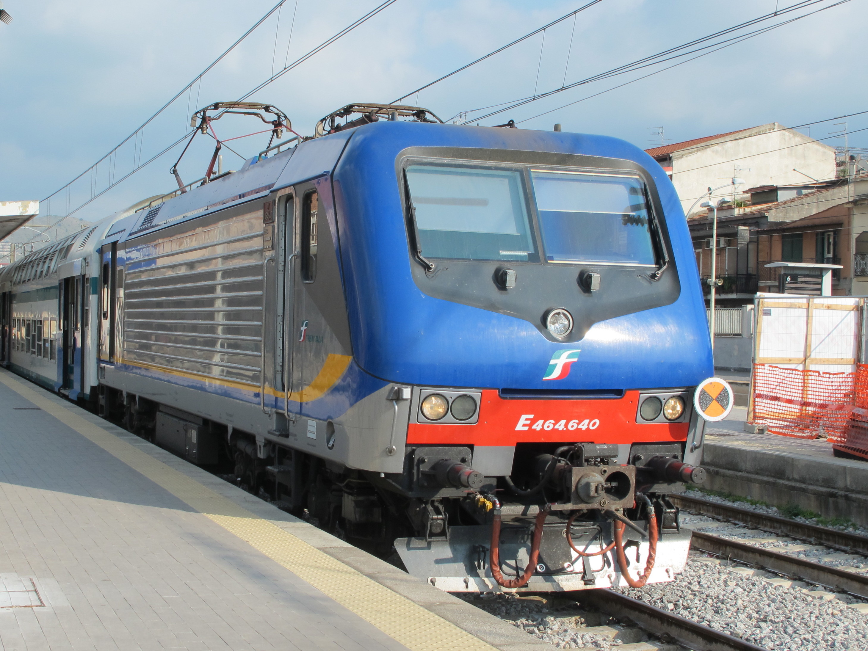 FS E464.640 in Caserta